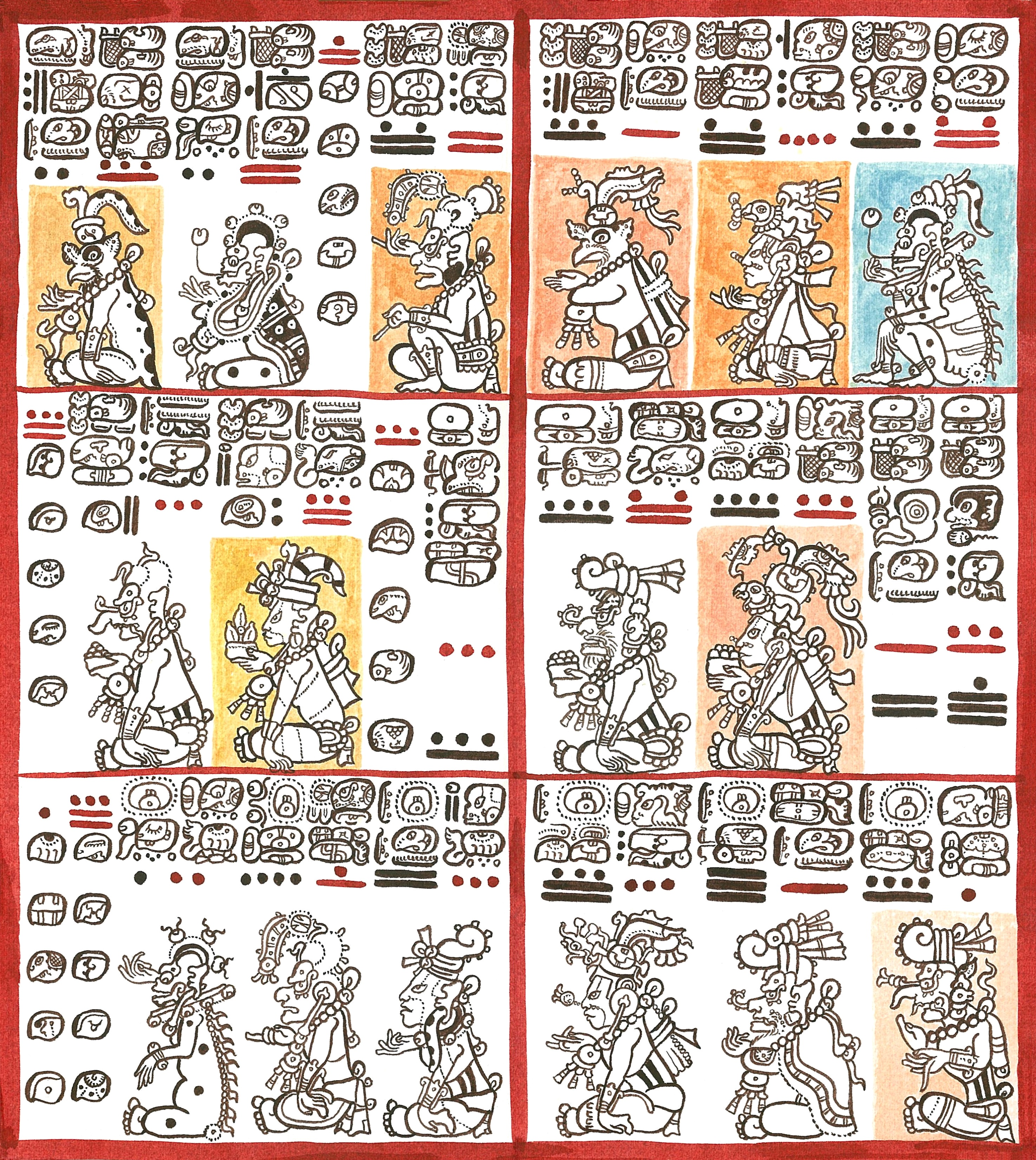 láminas 8 y 9 del Códice de Dresden, dibujado por Lacambalam.